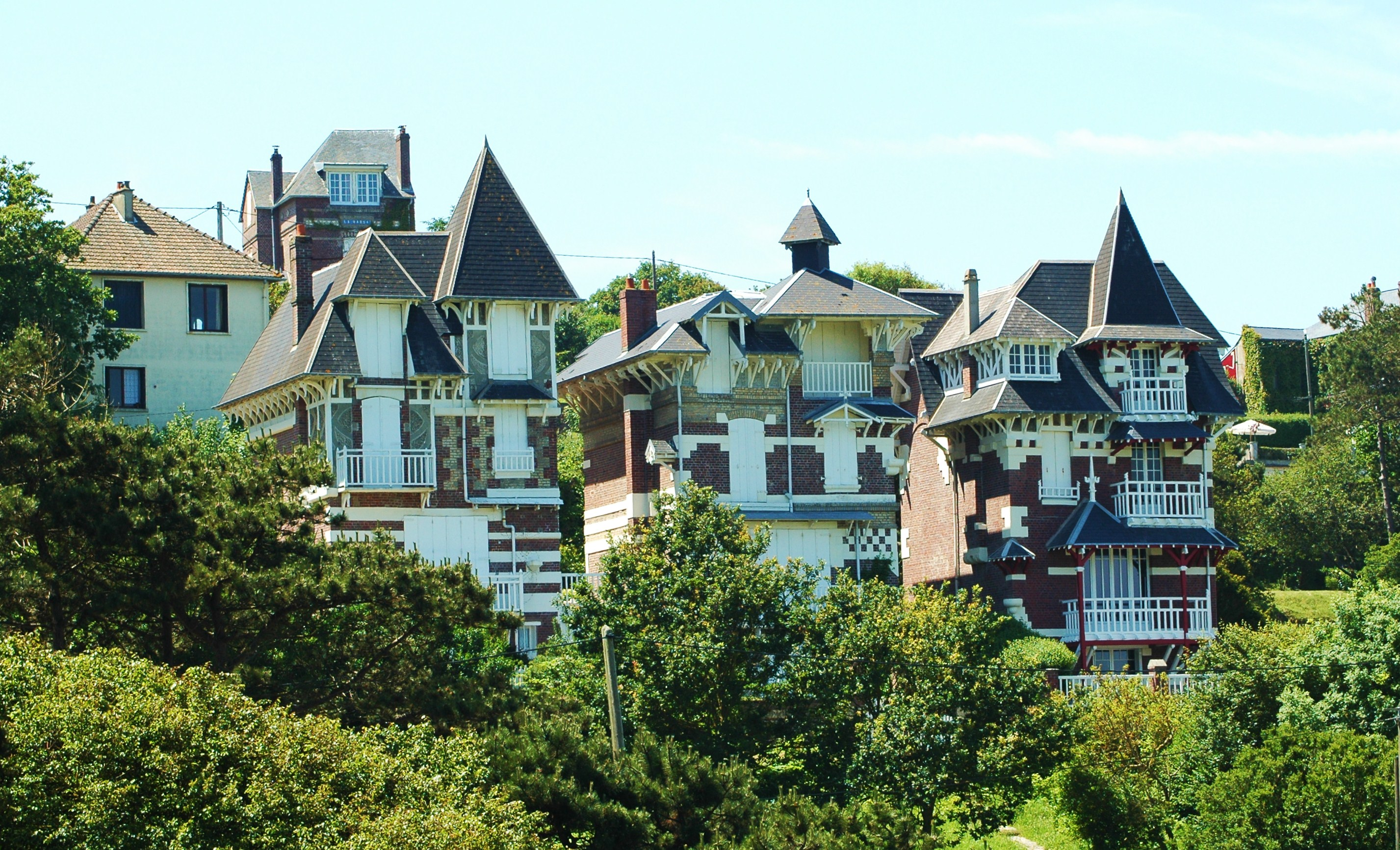 Le Bois-de-Cise (Somme, France). Villas.